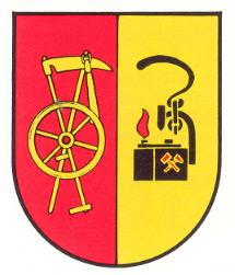 Wappen von Dunzweiler